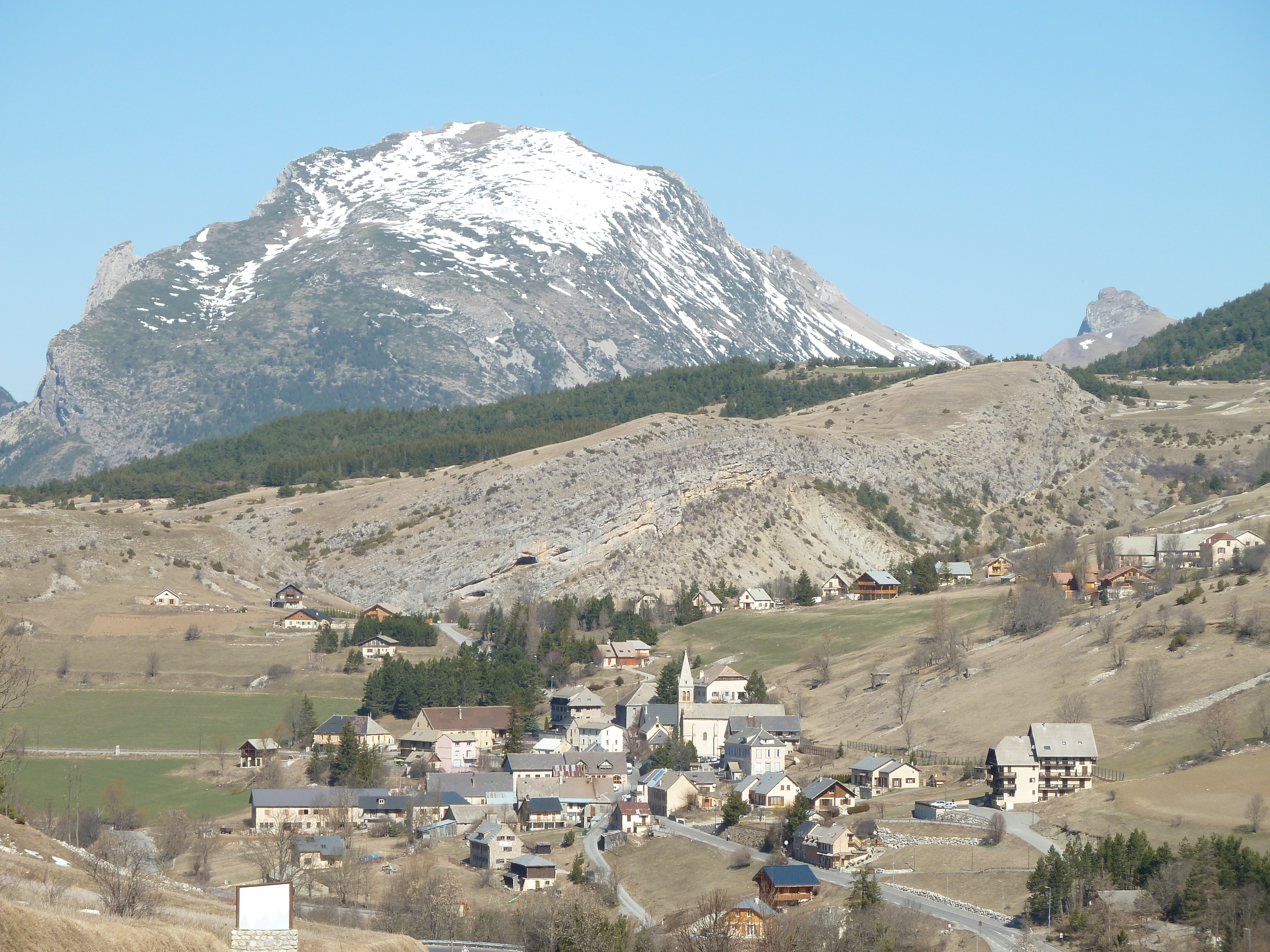 Vue générale de Saint-Étienne-en-Dévoluy. Au fond, le Gigon ou montagne de Saint-Gicon.